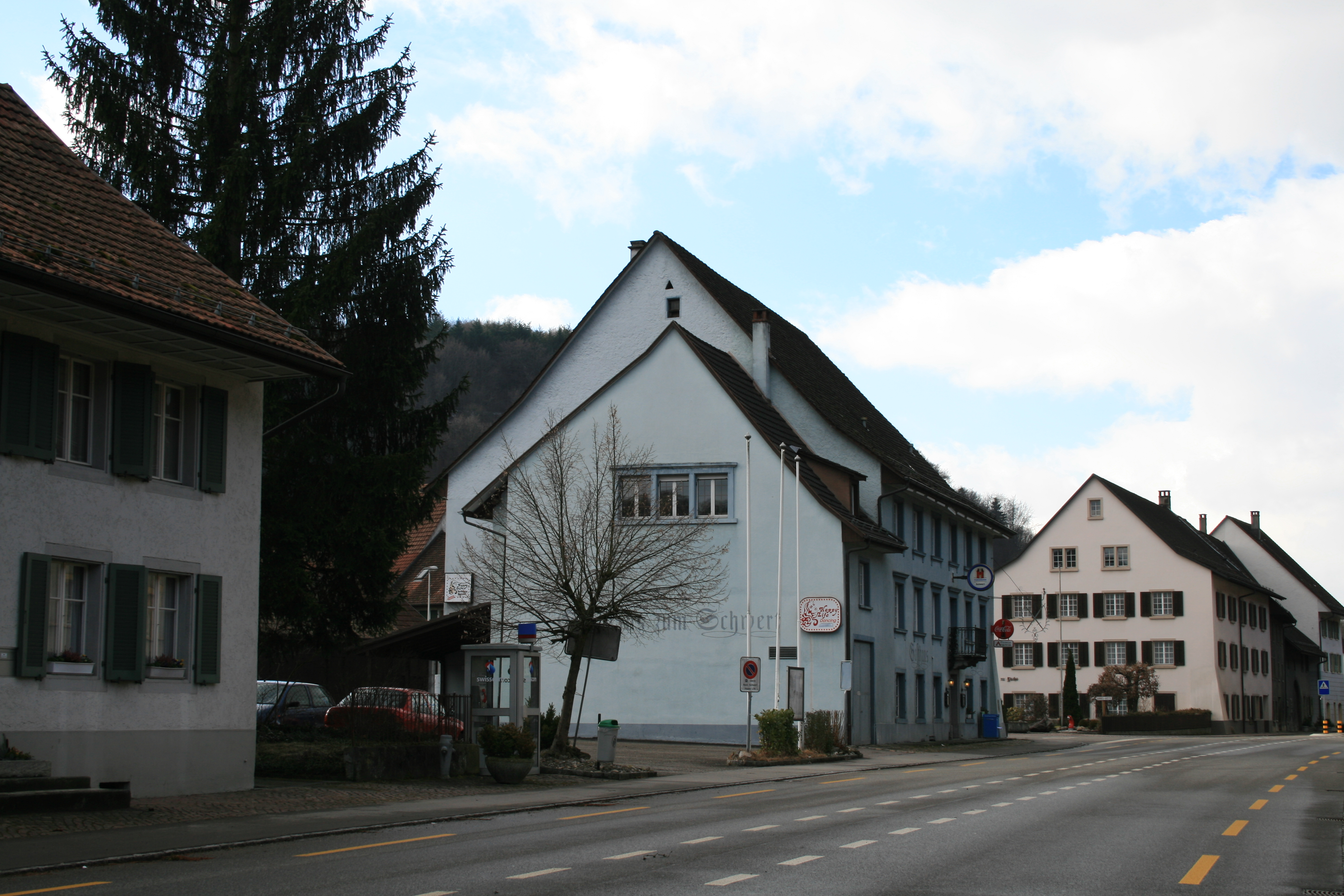 Hornussen AG, Schweiz